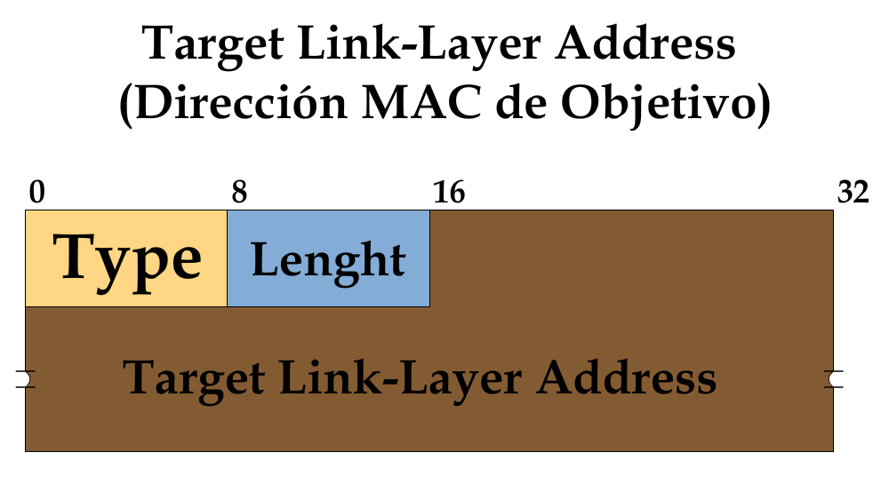 Formato de mensaje de opción ICMPv6 sobre la dirección MAC del objetivo.